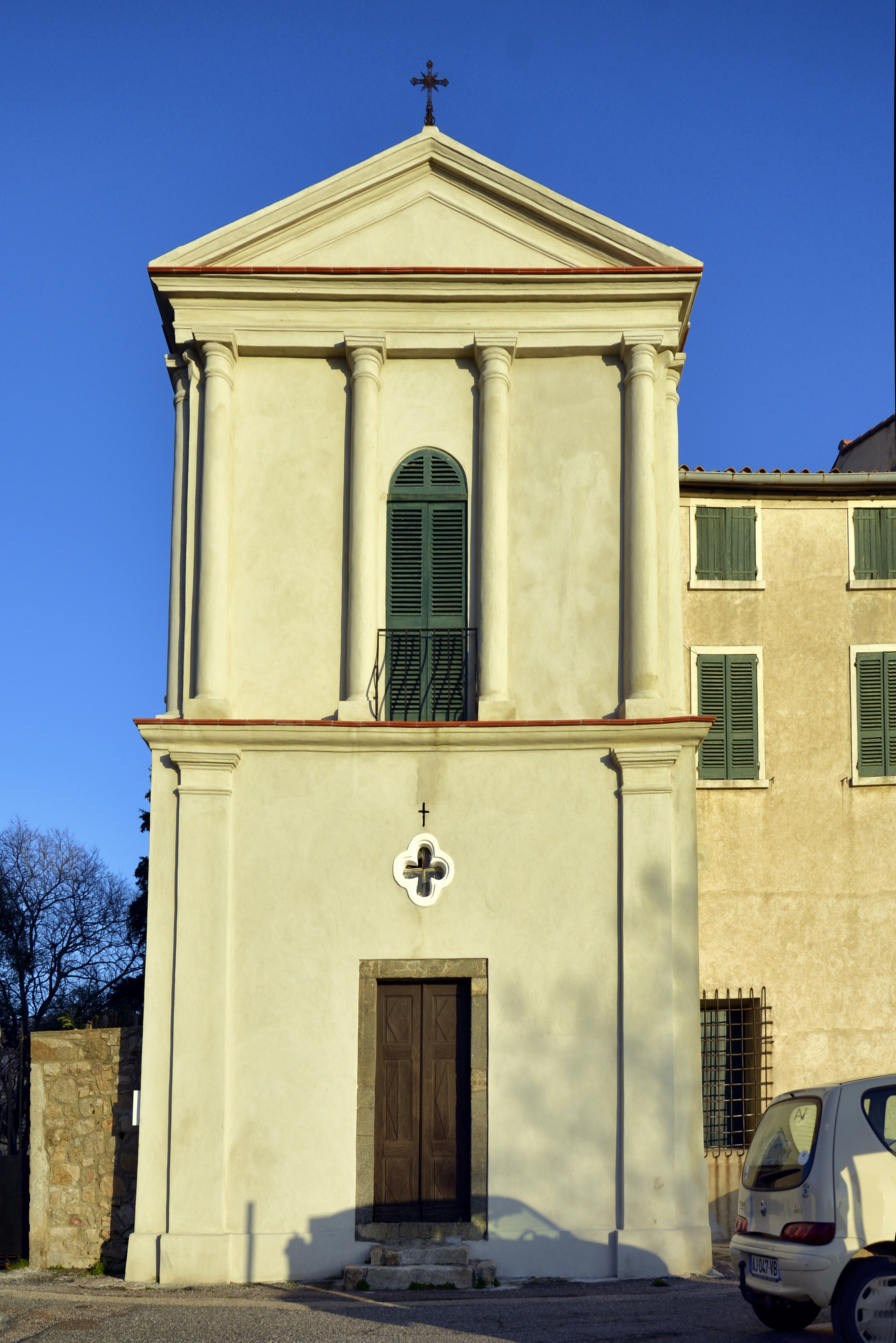 Montegrosso, Balagne (Corse) - Chapelle de Don Juan (Don Miguel de Mañara), propriété de la famille Colonna d'Anfriani, à Montemaggiore. Labelisée VMF – Patrimoine historique